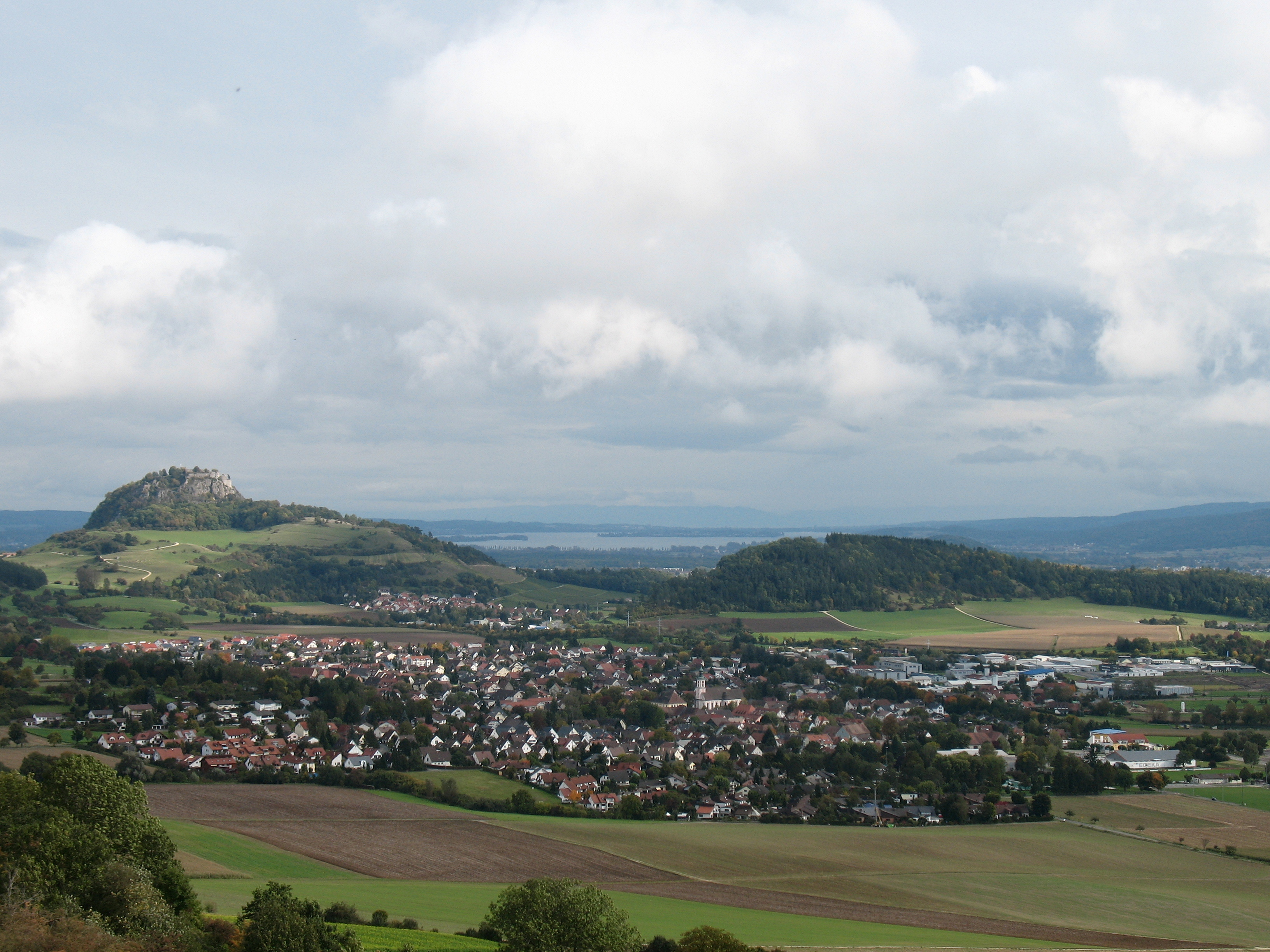 Hilzigen mit Hohentwiel und Bodensee im Hintergrund